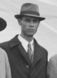 Collectie / Archief : Fotocollectie Anefo Reportage / Serie : [ onbekend ] Beschrijving : Aankomst West Indische delegatie Datum : 11 juni 1946 Trefwoorden : AANKOMST, delegatie Fotograaf : Bennekom, Ad van / Anefo Auteursrechthebbende : Nationaal Archief Materiaalsoort : Negatief (zwart/wit) Nummer archiefinventaris : bekijk toegang 2.24.01.03 Bestanddeelnummer : 901-8096 Reacties Geplaatst door Geschiedenis Overzeese Gebiedsdelen op 15 augustus 2017 - 18:55. V.l.n.r. van rechts naar links: F.J.G. Kwartsz, C.A. Eman, E.J. Jonkheer, dr. M.F. da Costa Gomez, W.L. Plantz (allen afkomstig van Curaçao) H. Miskin, S. Rambaran, A.M. van Eyck, J.C. Ho A Sjoe, F.H.R. Lim A Po, A.R.L. Smit (allen afkomstig uit Suriname) Plaats: Schiphol